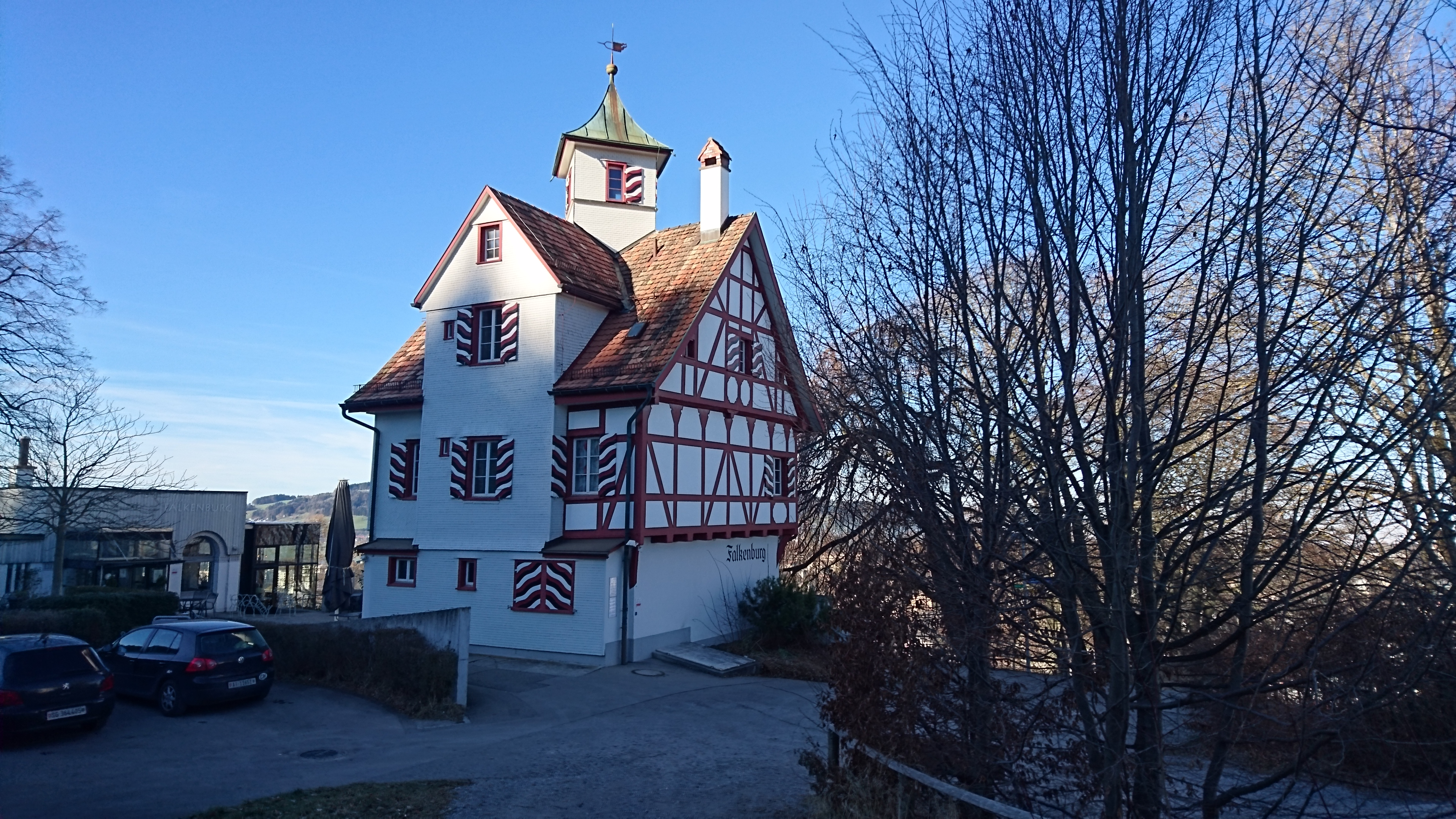 Das einstige 'Lustschlösschen' und heutige Restaurant Falkenburg von Süden her gesehen.